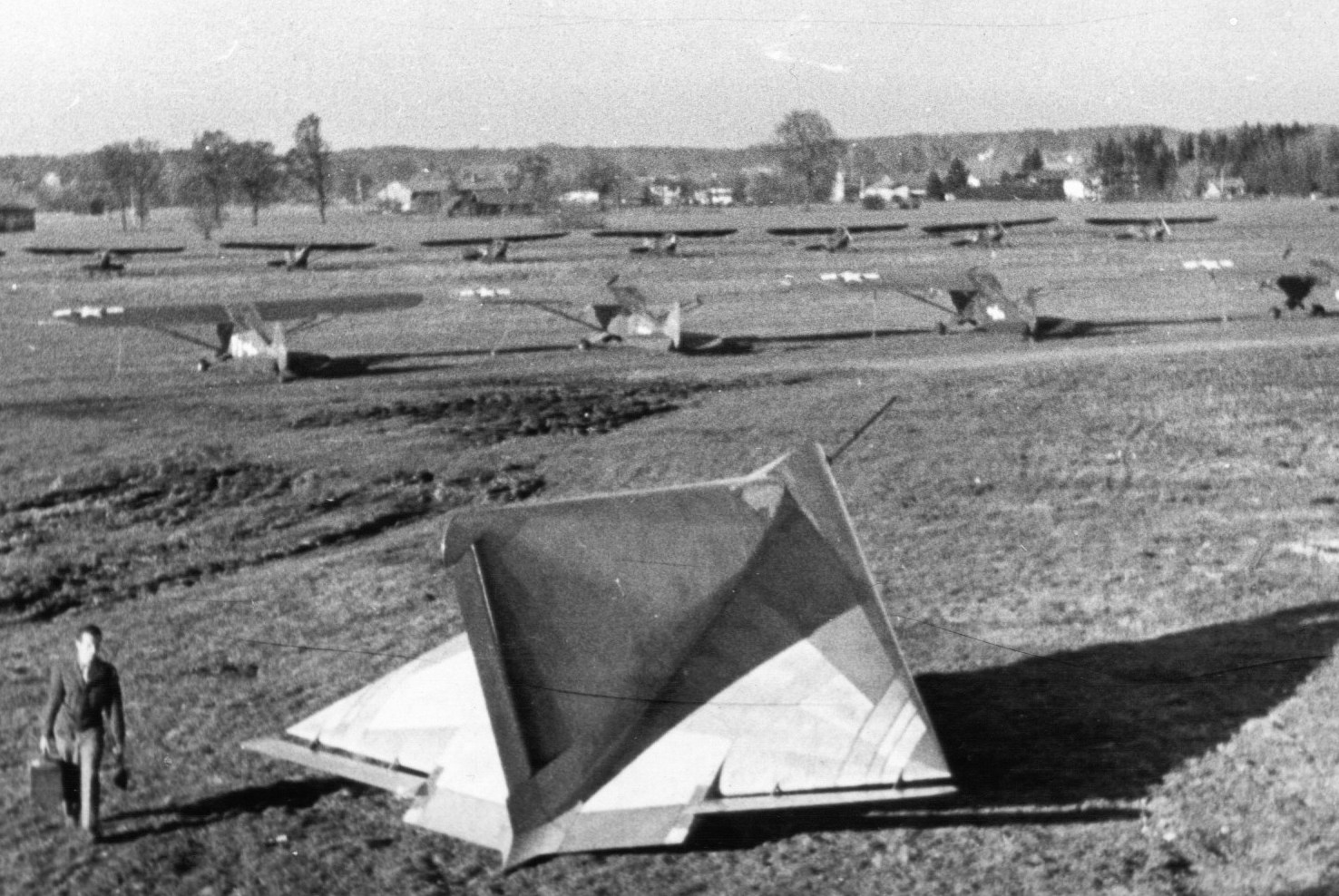 Die Akaflieg Darmstadt München DM 1 am Flughafen Prien am Chiemsee nach Kriegsende